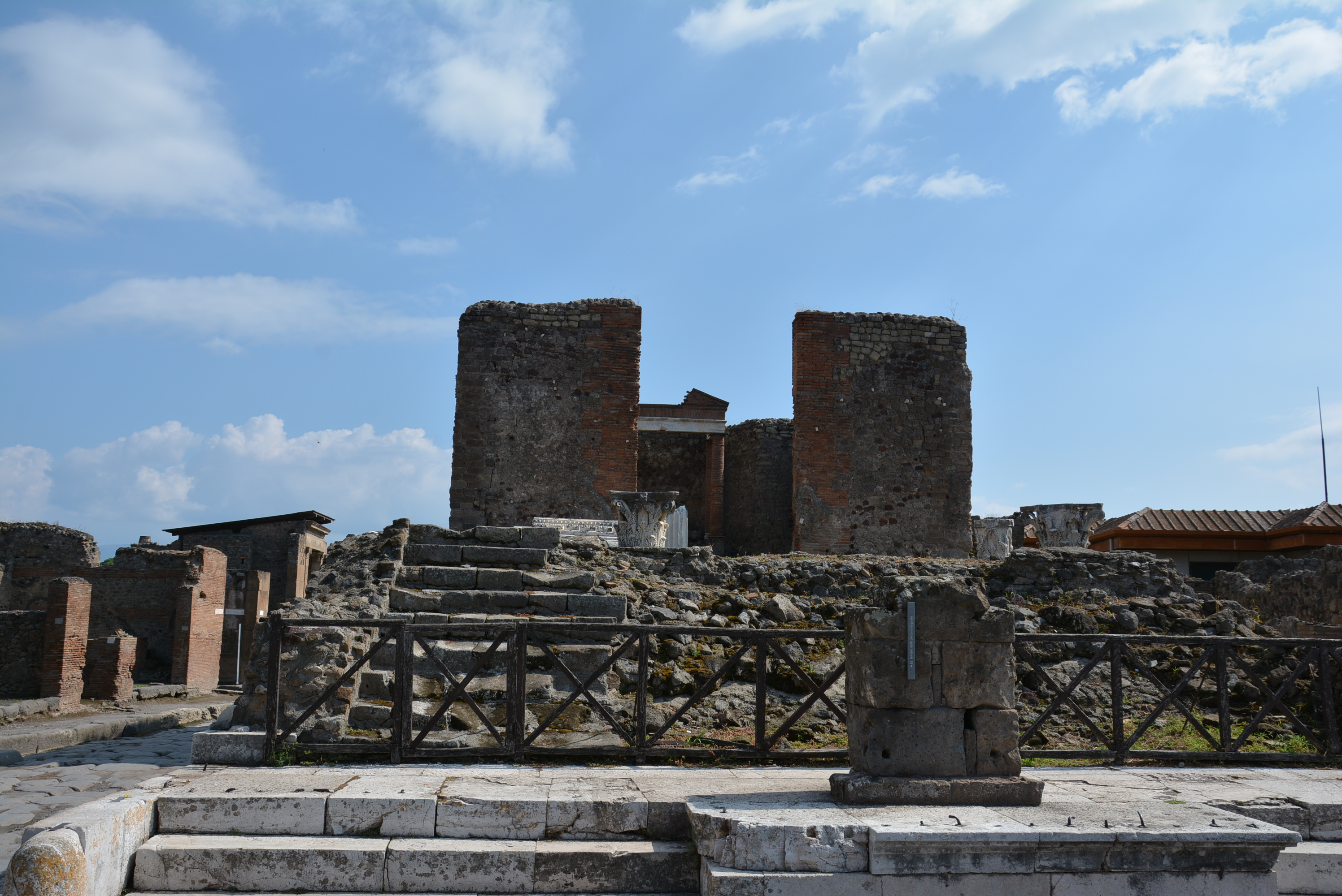 Tempio della Fortuna Augusta - MIBACT This is a photo of a monument which is part of cultural heritage of Italy.